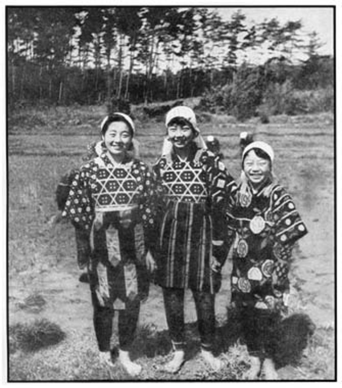 田植えに先立つ「五月忌み」と、中国から伝来した邪気払いの行事が結合したのが日本の「端午の節句」。この日にかかせない薬草「菖蒲」が「尚武」(しょうぶ・武事を尊ぶ気風) に通じることから、武士階級の行事にとりいれられ、女子の祭日に定着していた三月三日「桃の節句」と対をなすように、やがて「端午の節句」は男子の祝祭日として定着するが、もともとは、稲作に関連した豊穣を願う、女の祭りであった。